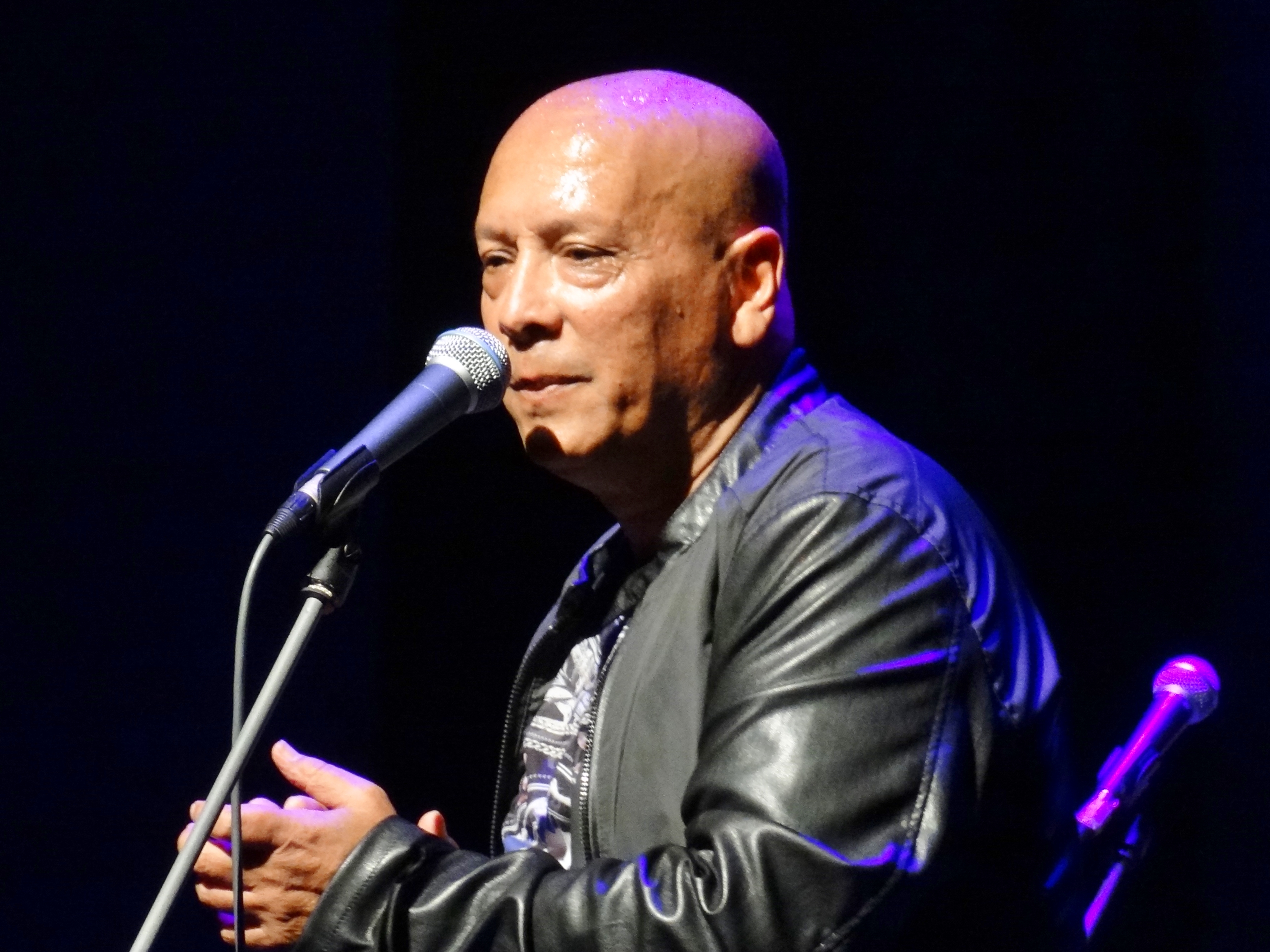 Lenny Zakatek in Artà, Mallorca, Spanien